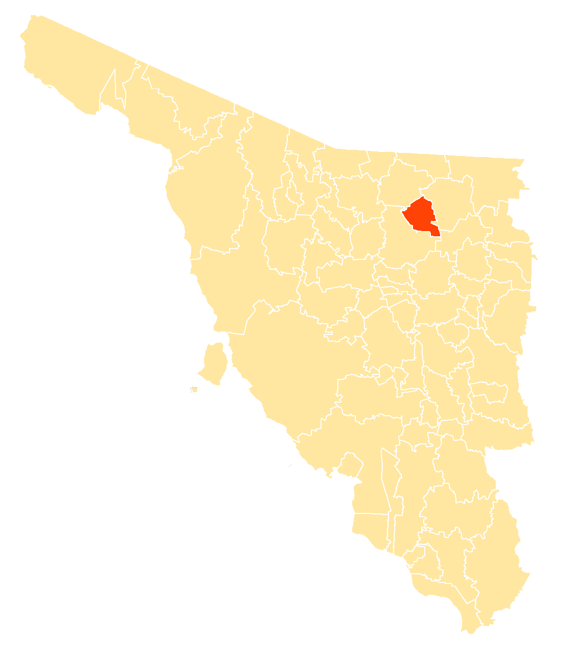 Municipio en Sonora, México.